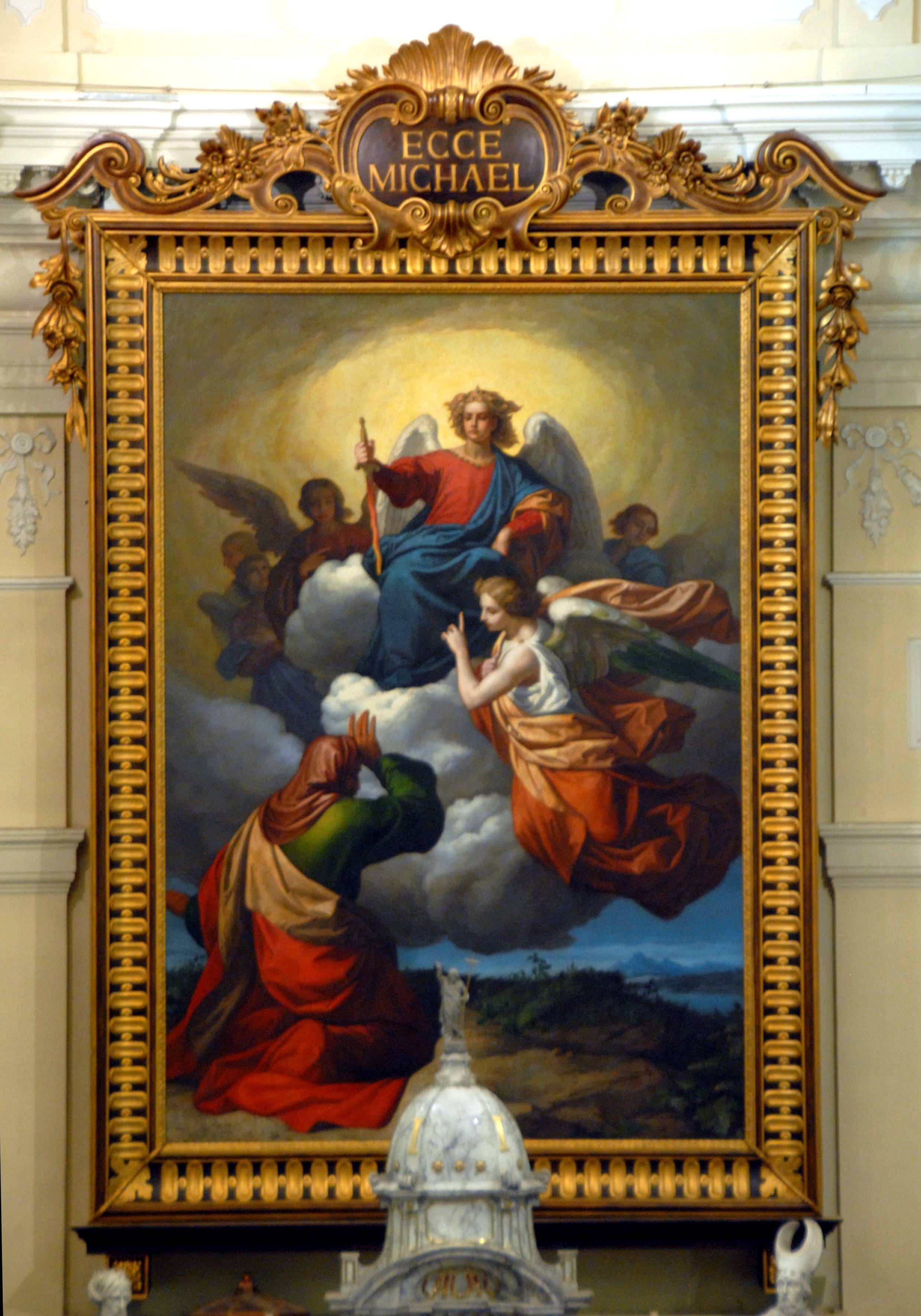 Pala d'altare dell'altare maggiore della Chiesa di San Michele Arcangelo ad Arsiero